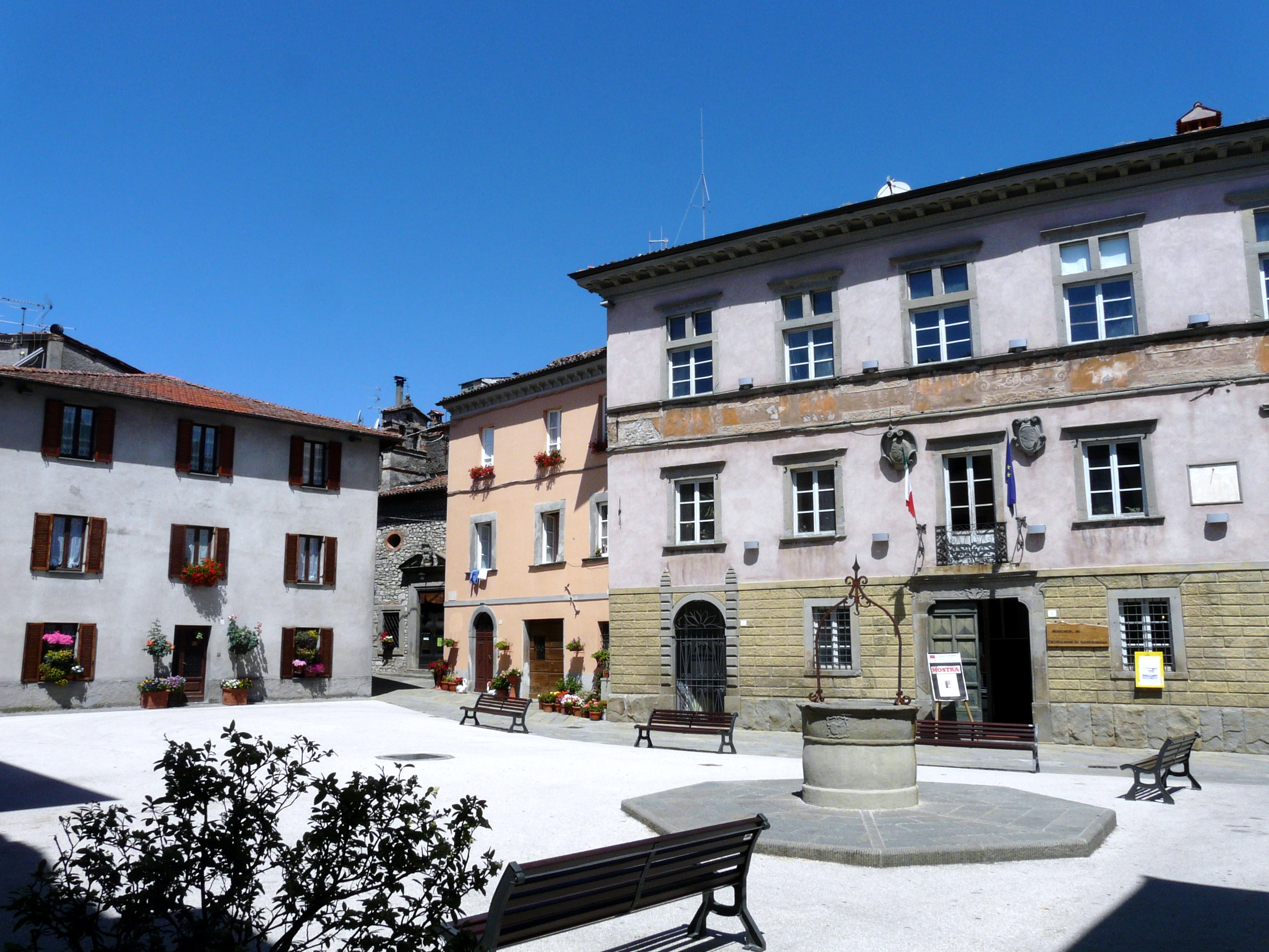 Piazza del municipio di Castiglione di Garfagnana, Toscana, Italia